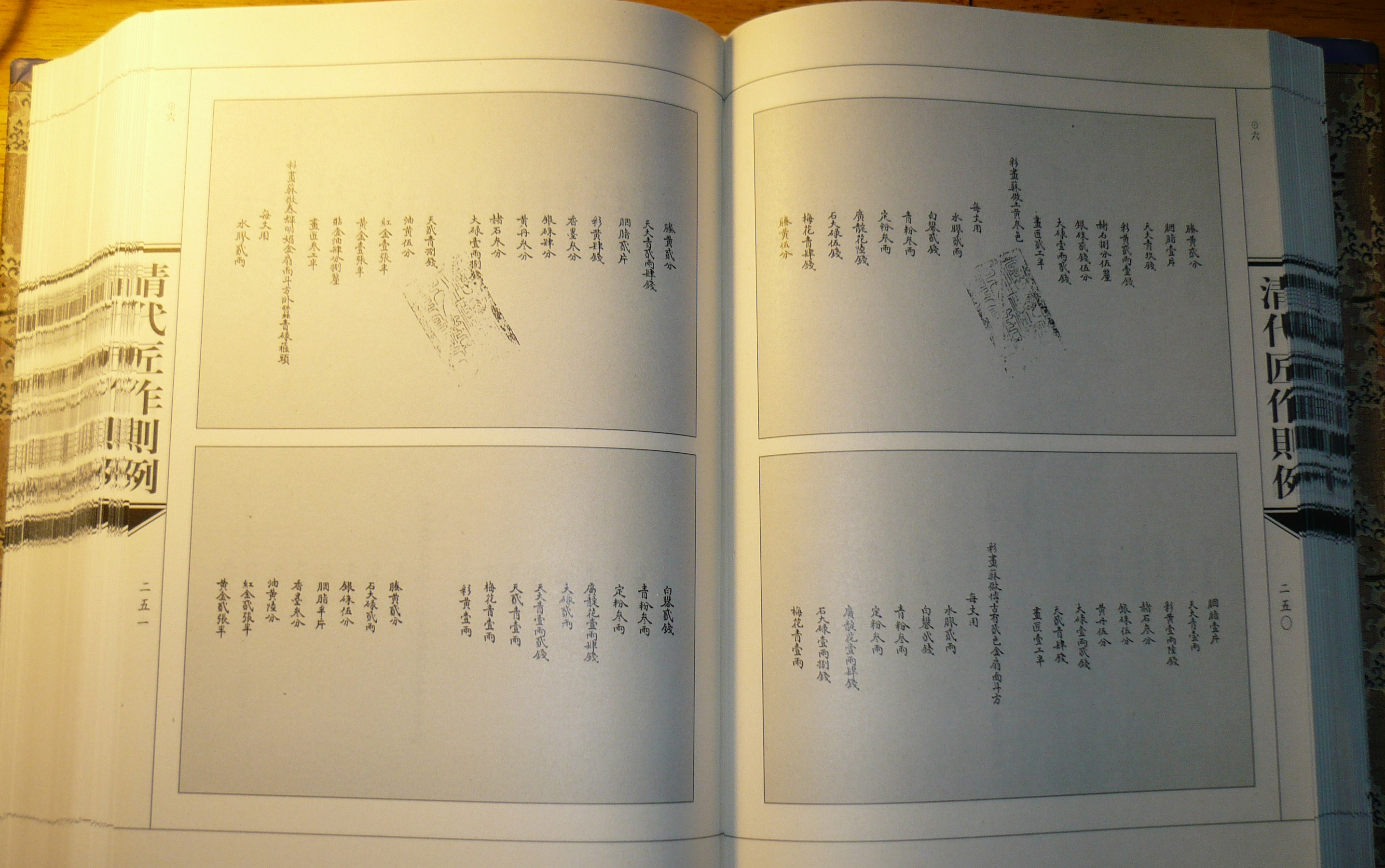 圆明园苏式彩画